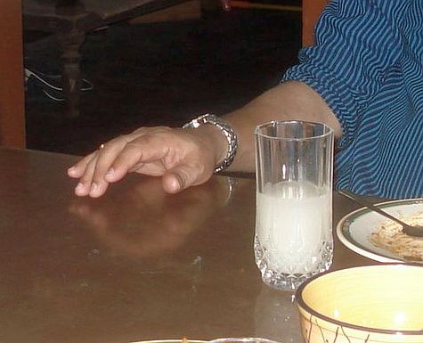 A Toddy